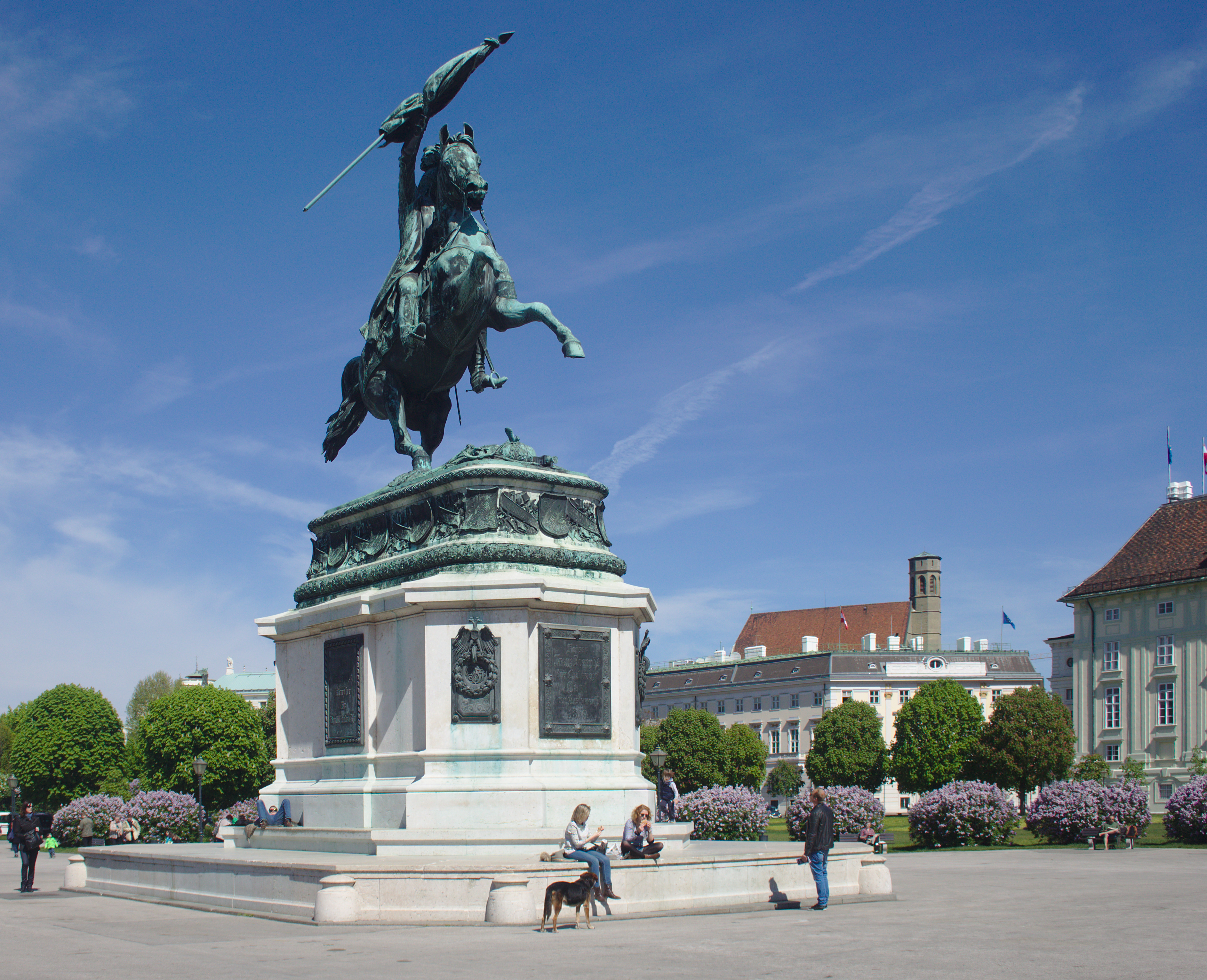 Erzherzog Karl-Denkmal